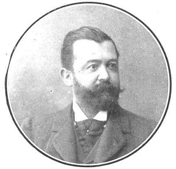 Retrato de Gabino Bugallal, fotografía de Manuel Compañy recogida en la revista española Mundo Gráfico.